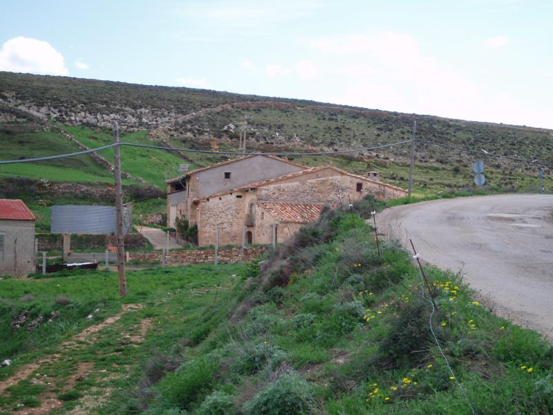 Masía del Mojón en Olocau del Rey, Castellón, España / Spain